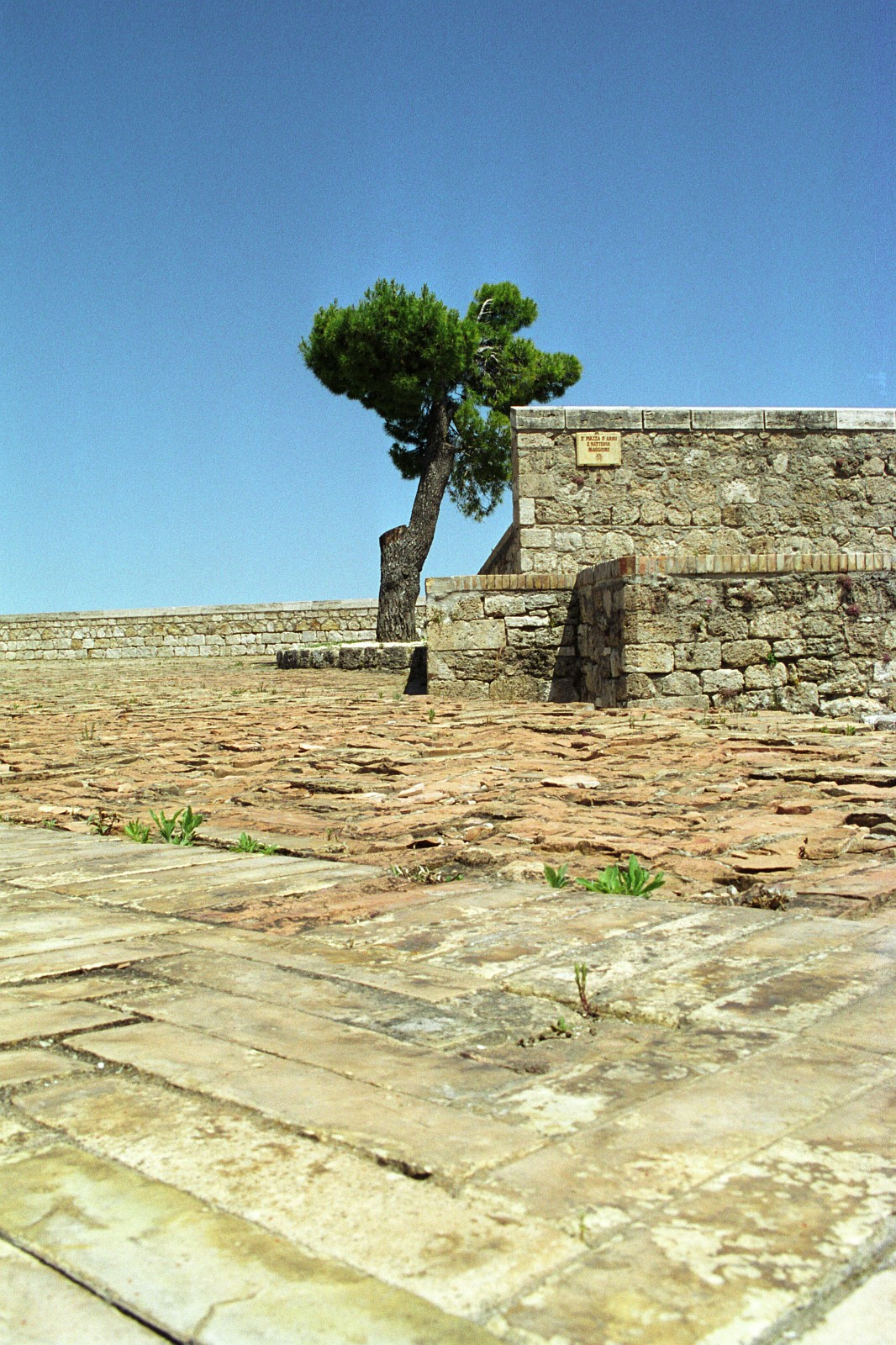 Civitella del tronto, Abruzzo, Italia